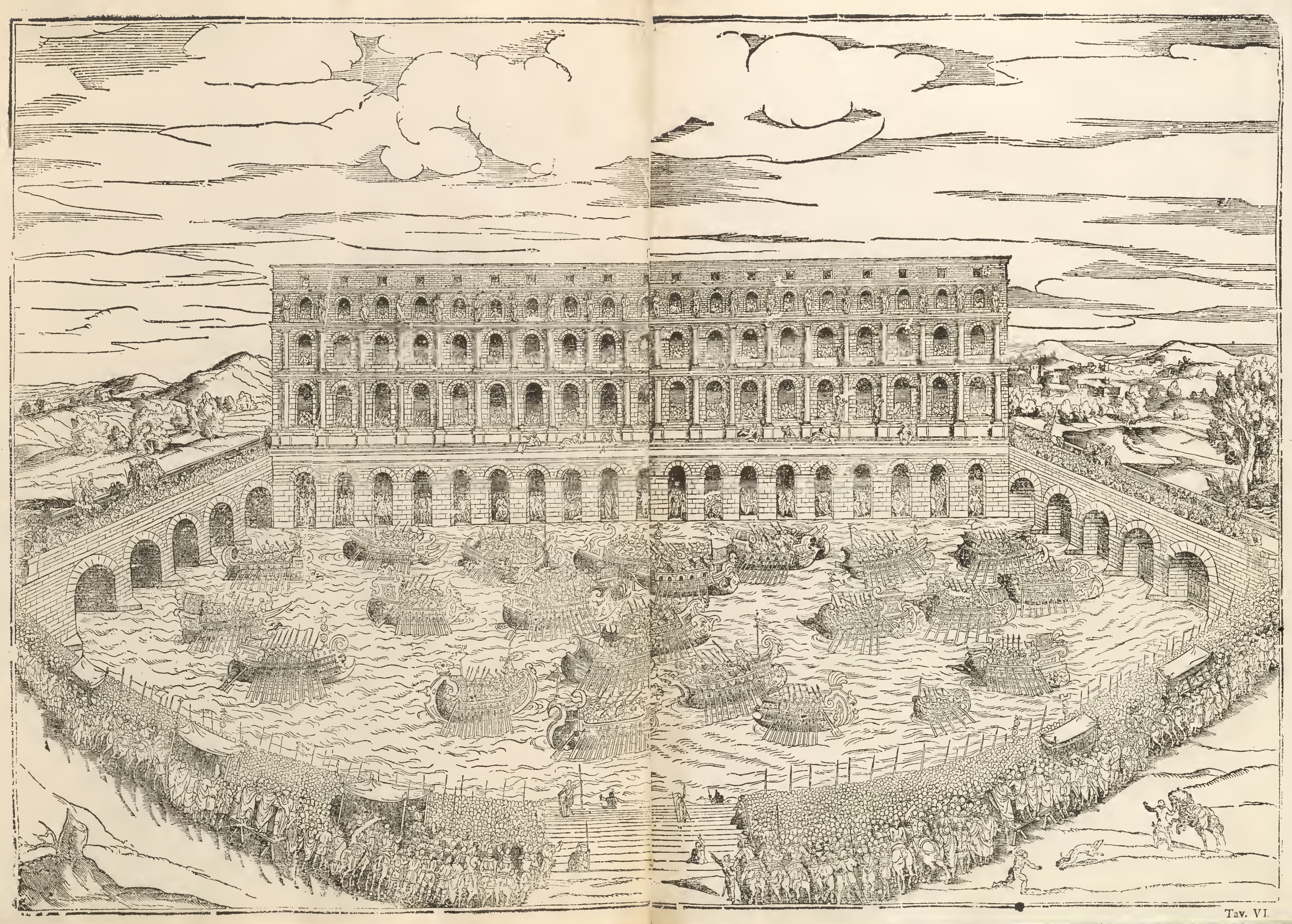 Vista dall'altra parte dell'Adige durante una naumachia sul fiume. Sullo sfondo la facciata principale del teatro romano, mentre ai lati ponte Pietra e ponte Postumio.